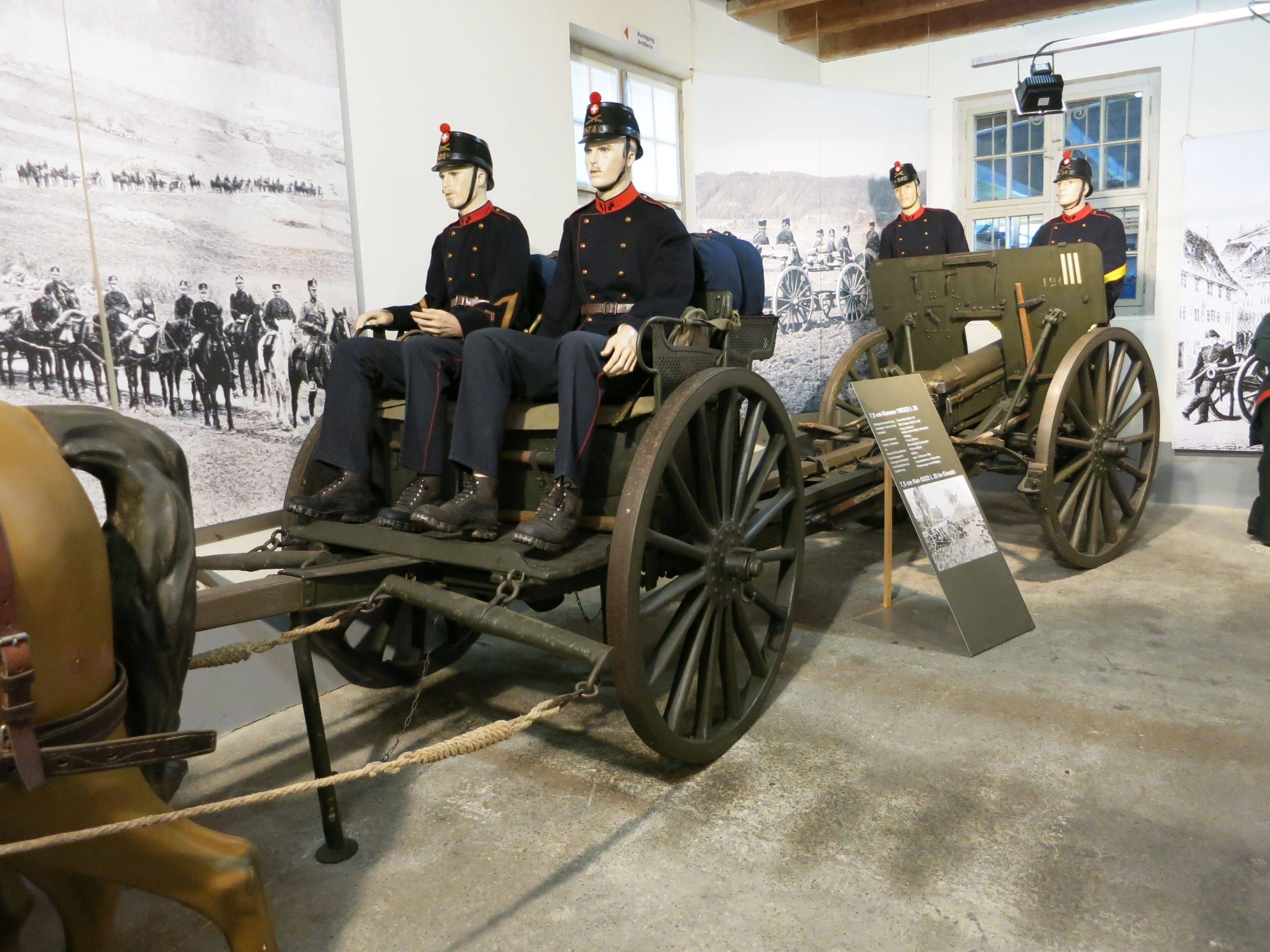 Museum im Zeughaus, Schaffhausen SH, Schweiz